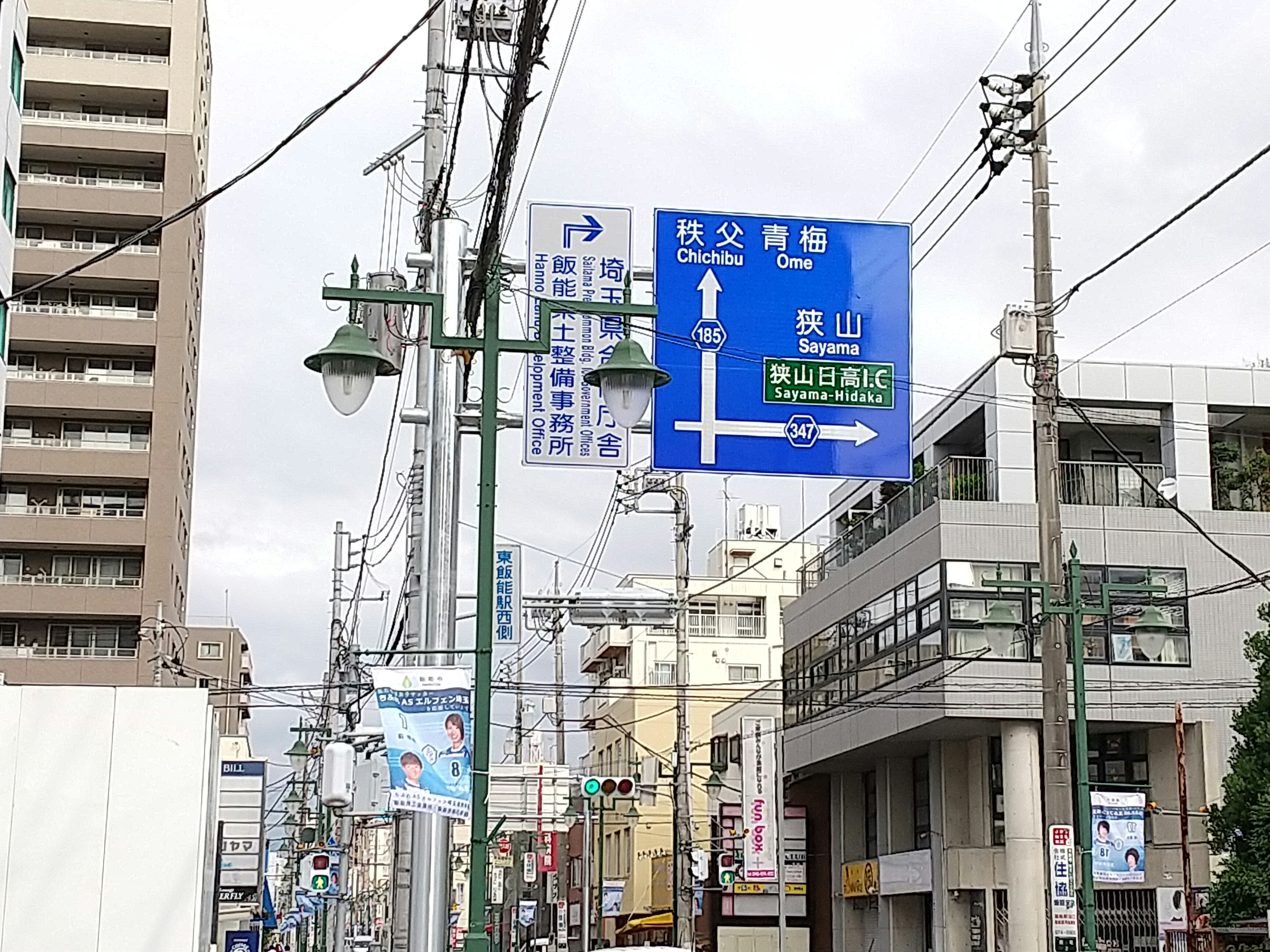 飯能市東町付近にて